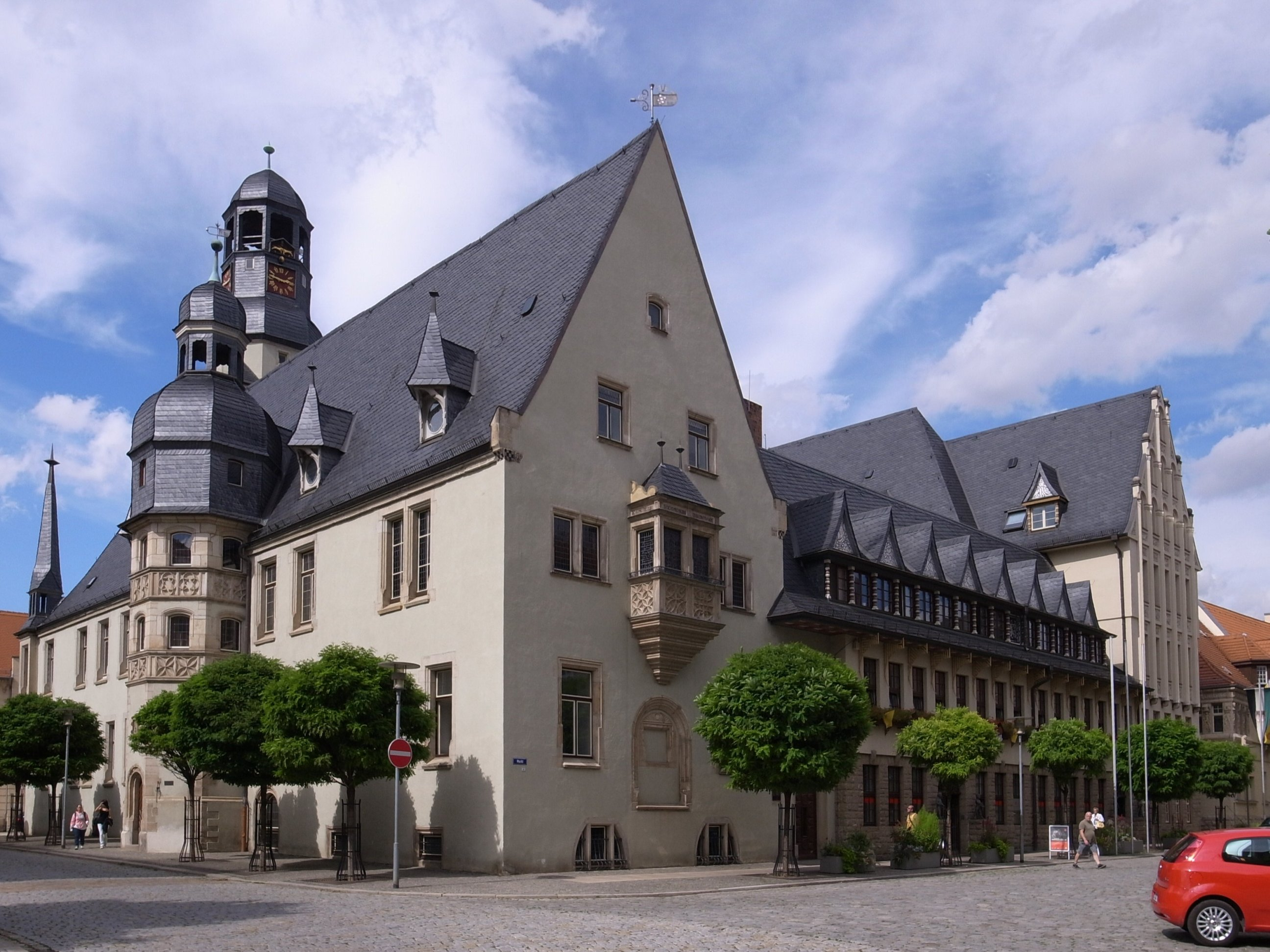 Aschersleben, Rathaus